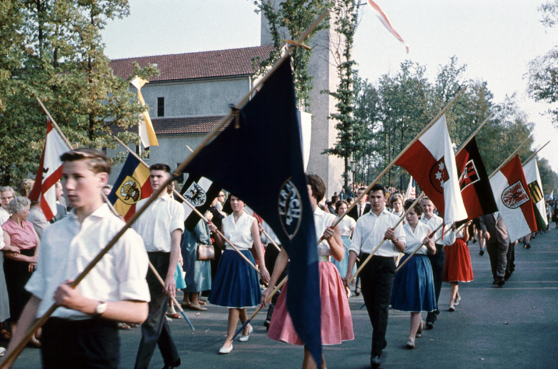 Festumzug 10 Jahre Espelkamp-Mittwald am 3. Oktober 1959 - Fahnenträger der Landsmannschaften. Im Hintergrund die Kirche der katholischen Kirchengemeinde St. Marien.